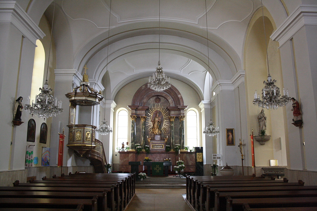 Altar der Pfarrkirche der niederösterreichischen Gemeinde Pottenstein.